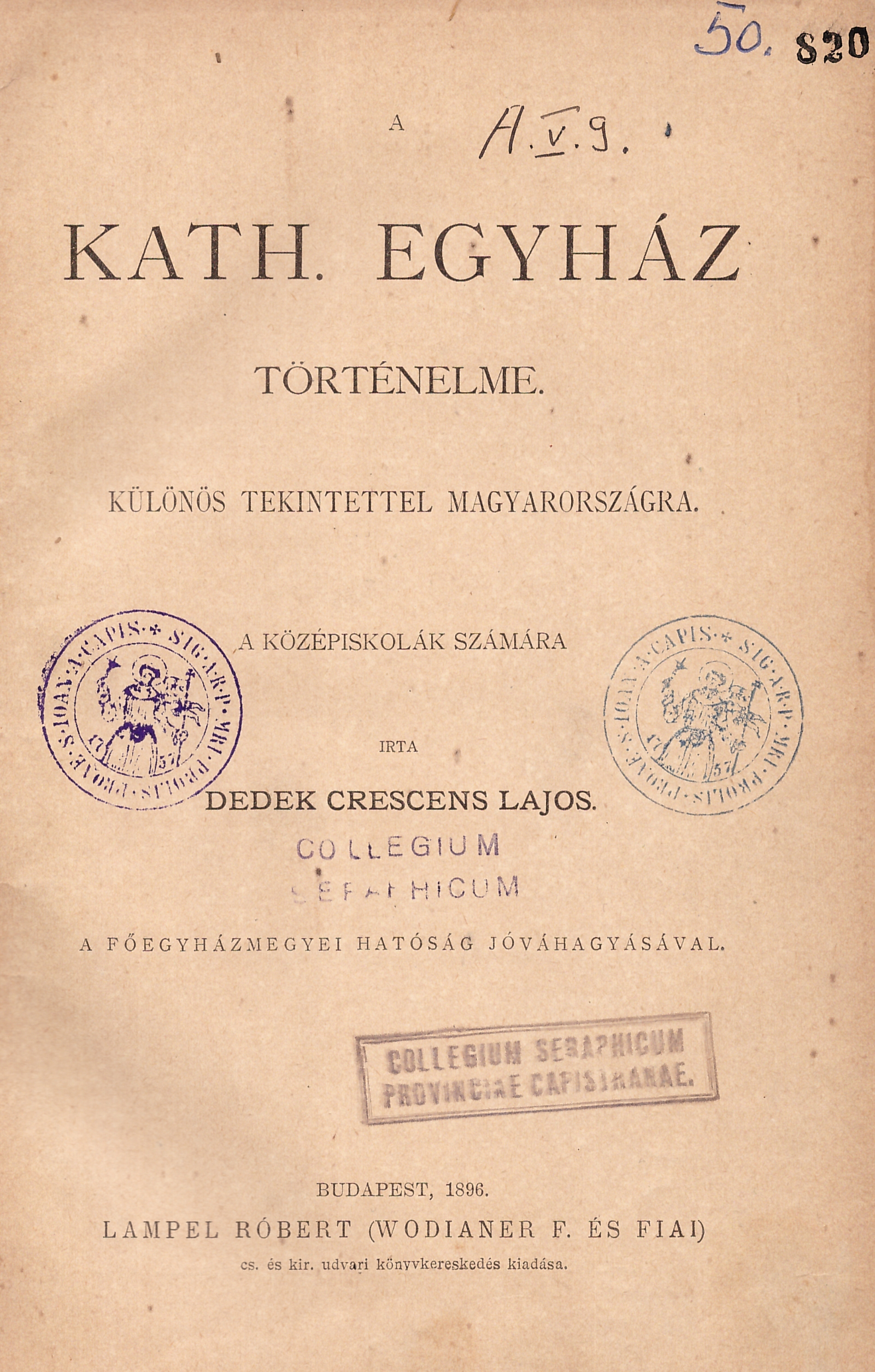 Dedek Crescens Lajos (1862-1933): A katholikus egyház történelme. (saját készítésű kép)